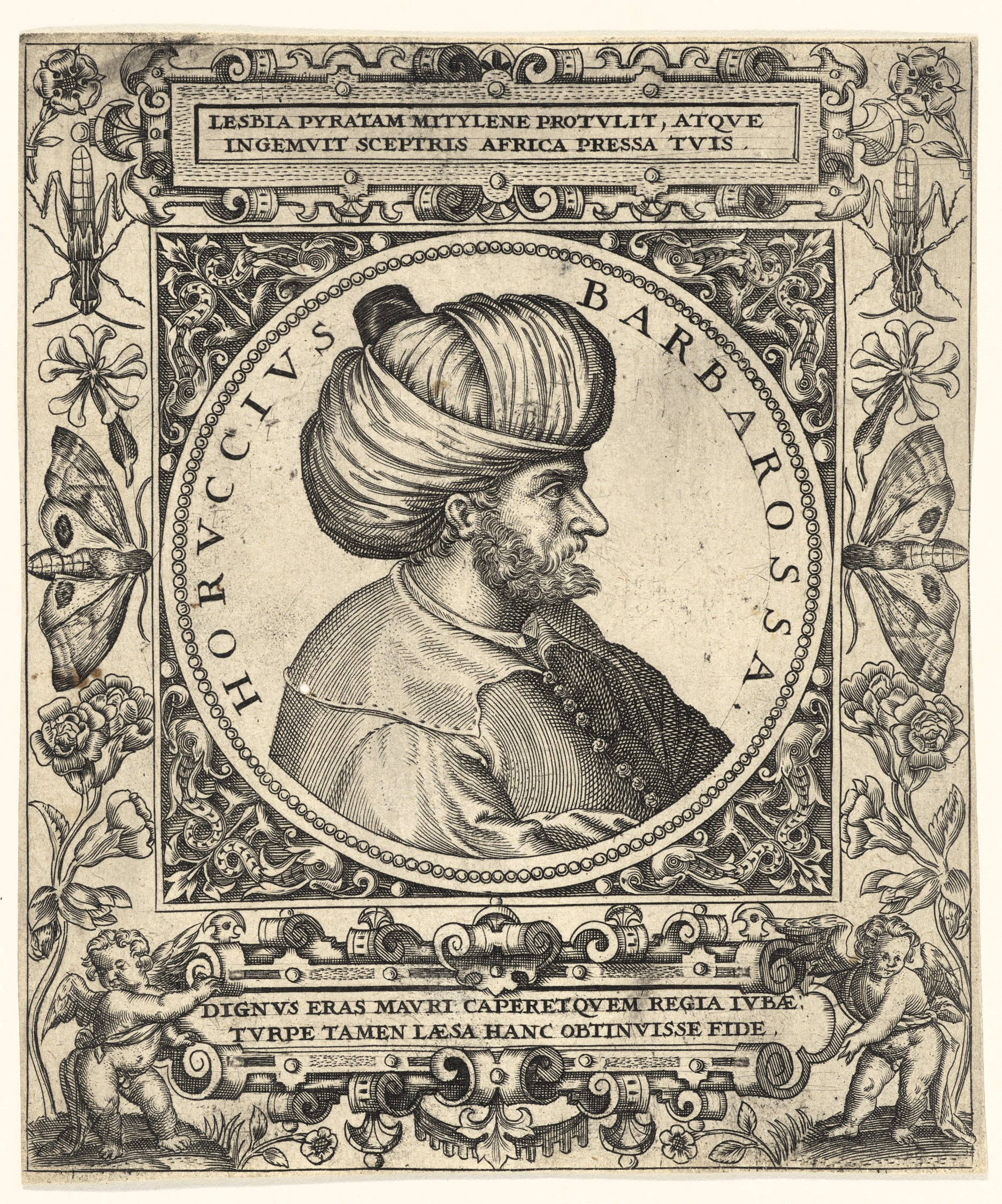 Grafik aus dem Klebeband Nr. 1 der Fürstlich Waldeckschen Hofbibliothek Arolsen. S. 465. Illustration aus: Georg Greblinger: Wahre Abbildungen der Türckischen Kayser vnd Persischen Fürsten / so wol auch anderer Helden und Heldinnen von dem Osman / biß auf den andern Mahomet. Johann Ammon, Frankfurt 1648 Motiv: "Horuccius Barbarossa" (= Arudsch Barbarossa)